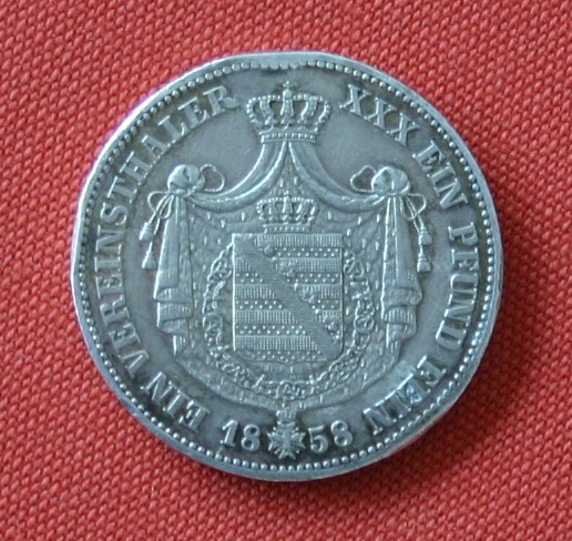 Revers eines Vereinsthalers Sachsen Weimer-Eisenachs aus 1858